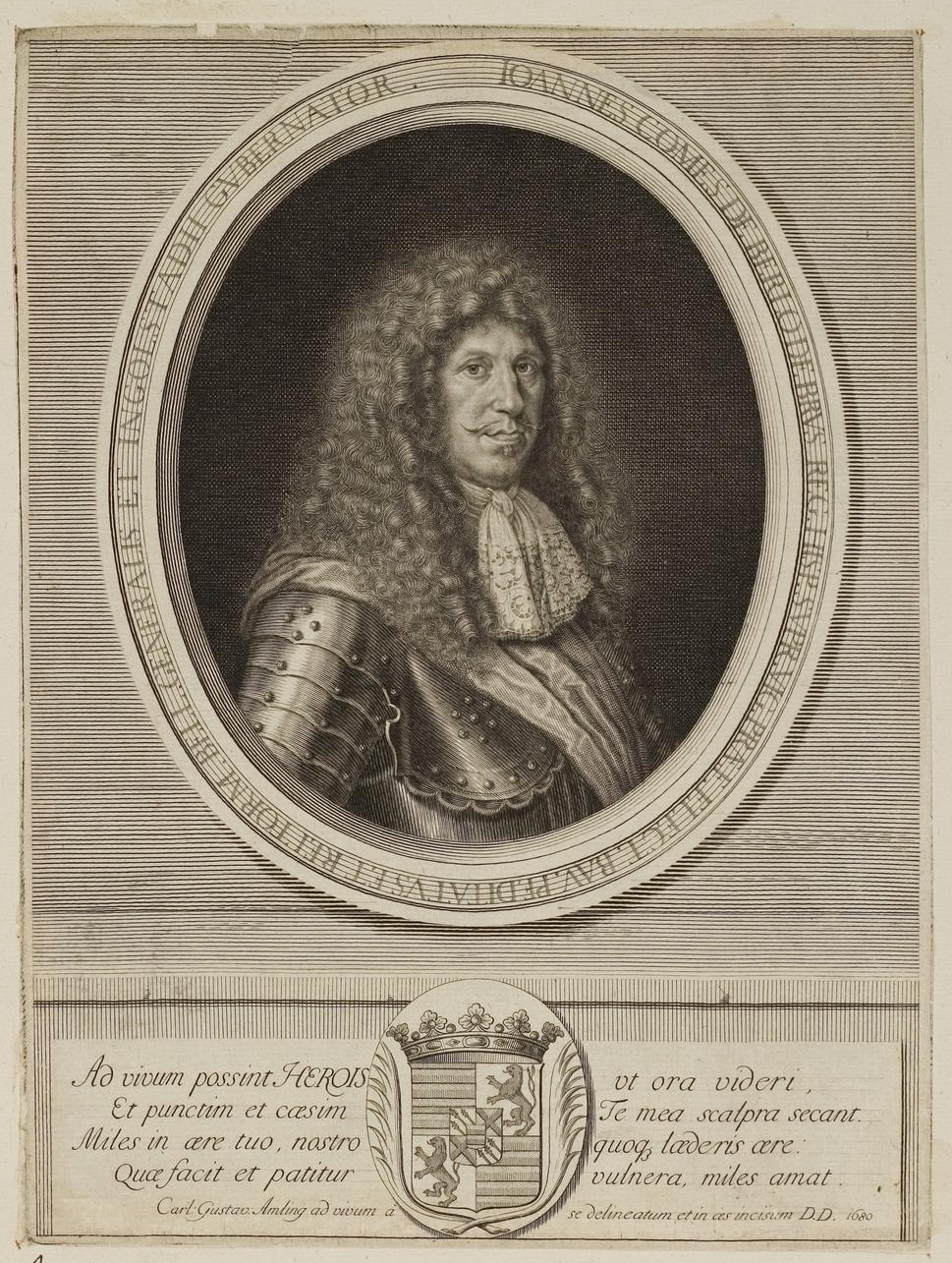 Grafik aus dem Klebeband Nr. 1 der Fürstlich Waldeckschen Hofbibliothek Arolsen Motiv: "Ioannes Comes de Berlo de Brus" (Jean de Berlo, General in kurbayerischen Diensten und Guberantor von Ingolstadt; wurde 1668 in den Grafenstand erhoben; Vater von Ferdinand de Berlo)